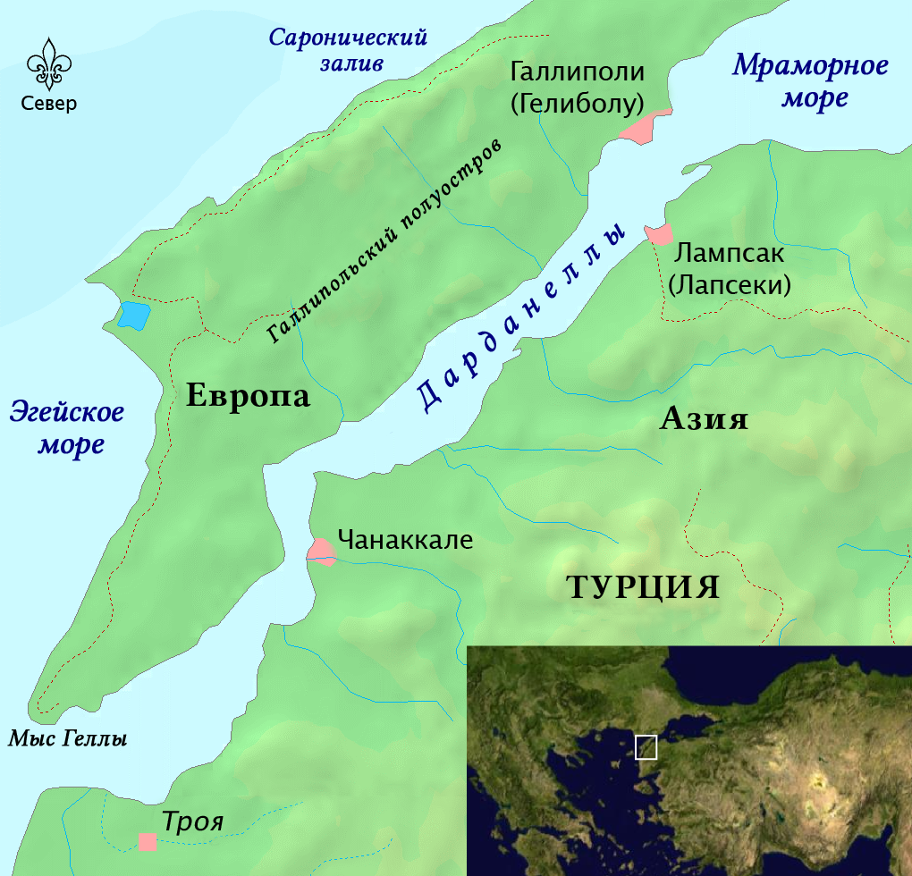 Carte du détroit des Dardanelles (Turquie)